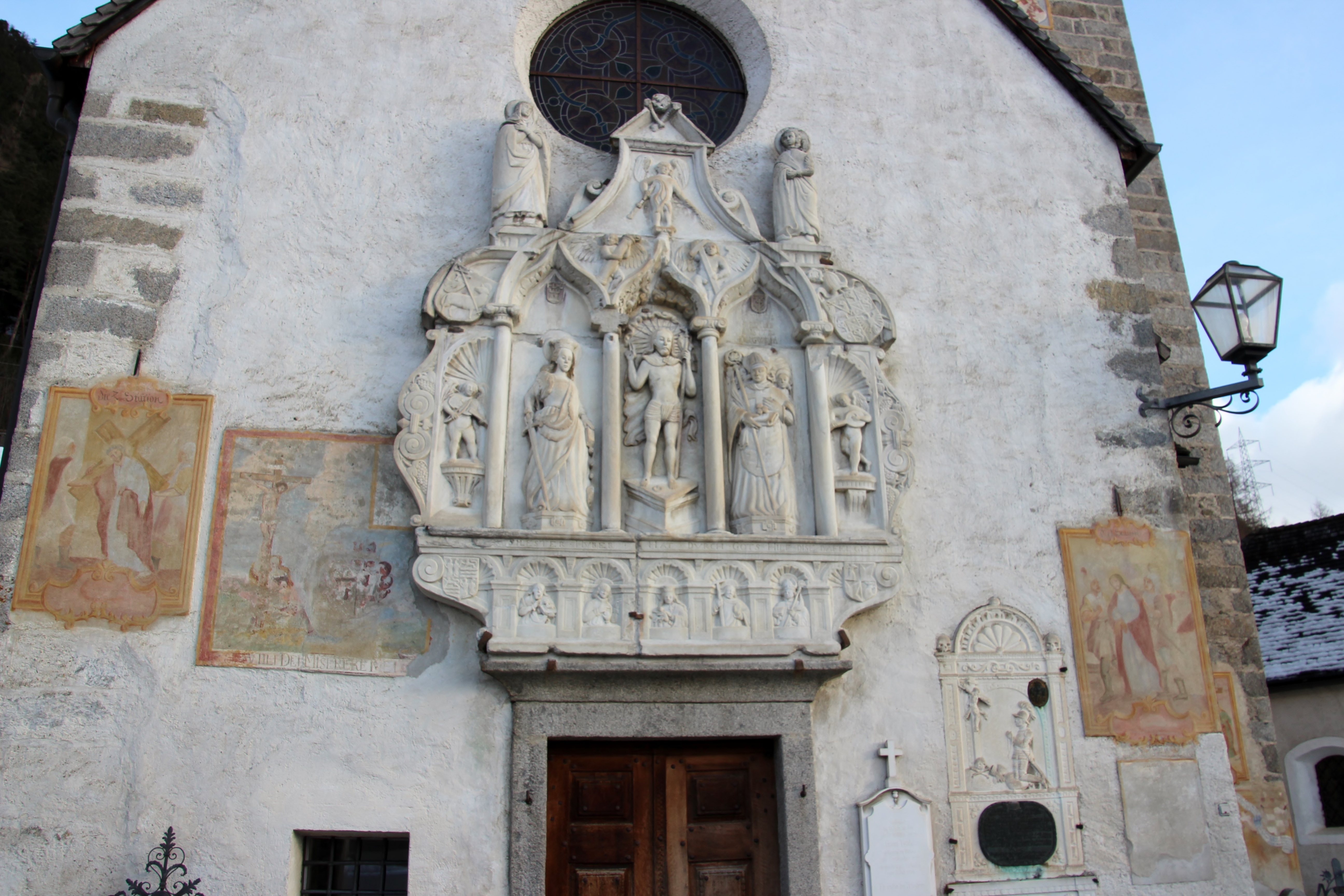 Pfarrkirche St. Katharina in Aufhofen - Eingangsportal